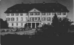 Reifensteiner Schule Metgethen